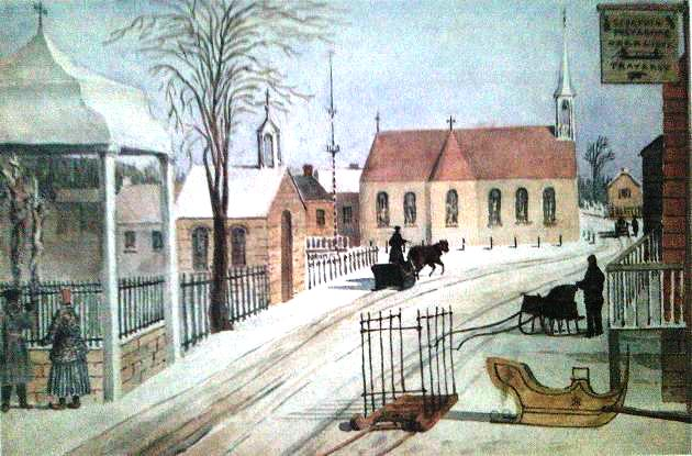 Tableau peint par Robert Frederick Mountain en 1840. Dans la collection du Musée national des beaux-arts du Québec.